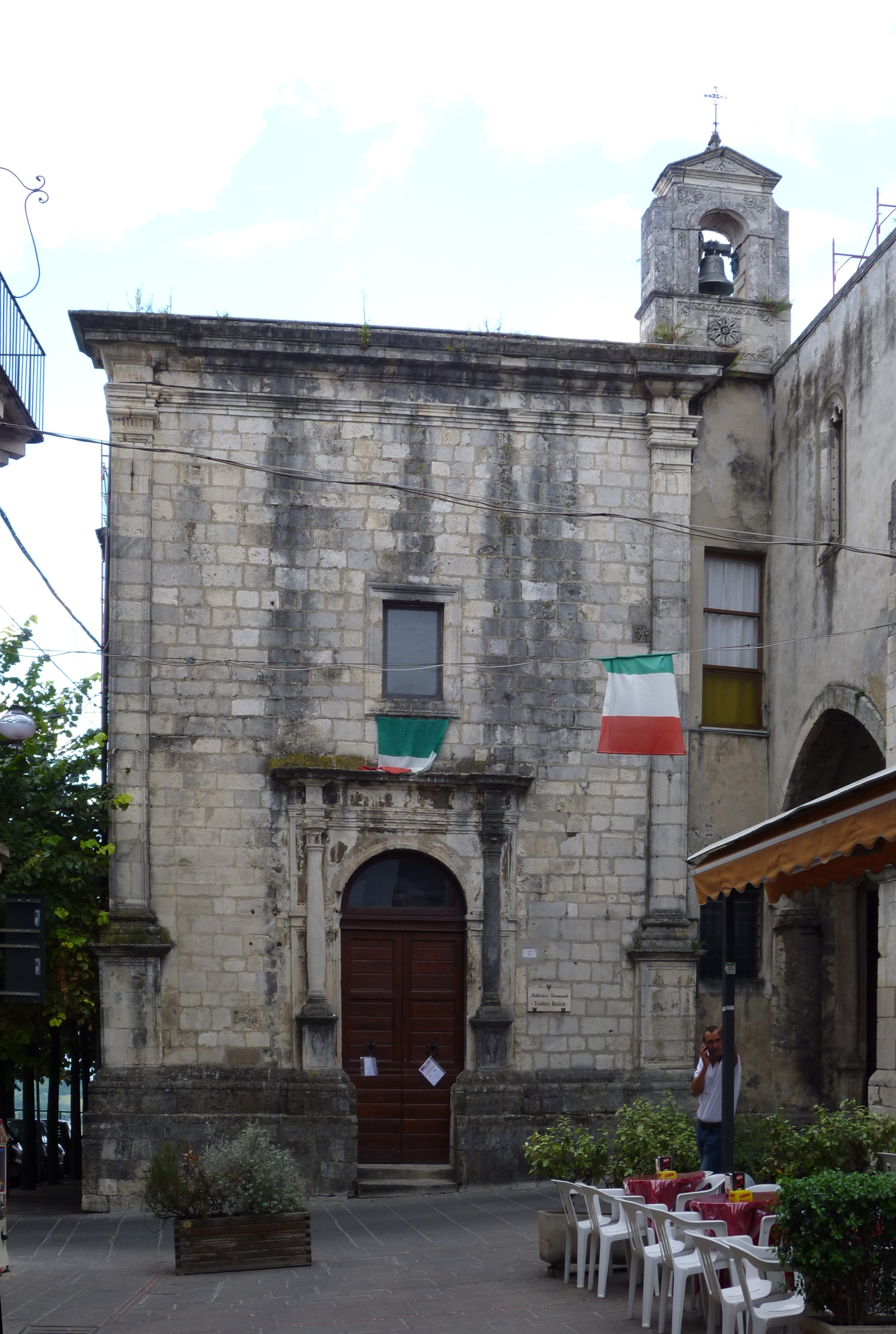 Biblioteca di Guardiagrele, provincia di Chieti, Abruzzo